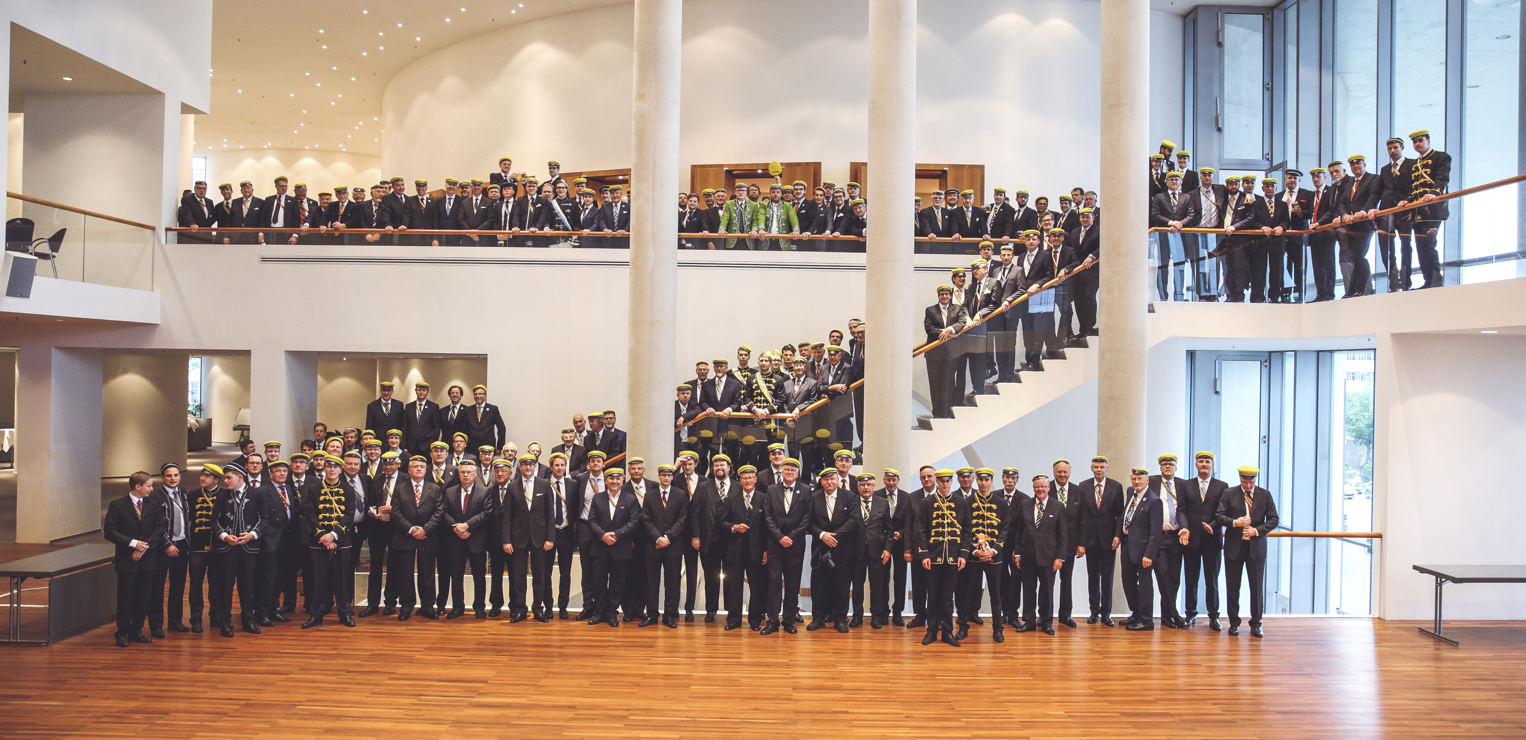 Corps Suevia Freiburg beim 200. Stiftungsfest in der Vorhalle vom Konzerthaus in Freiburg im Breisgau